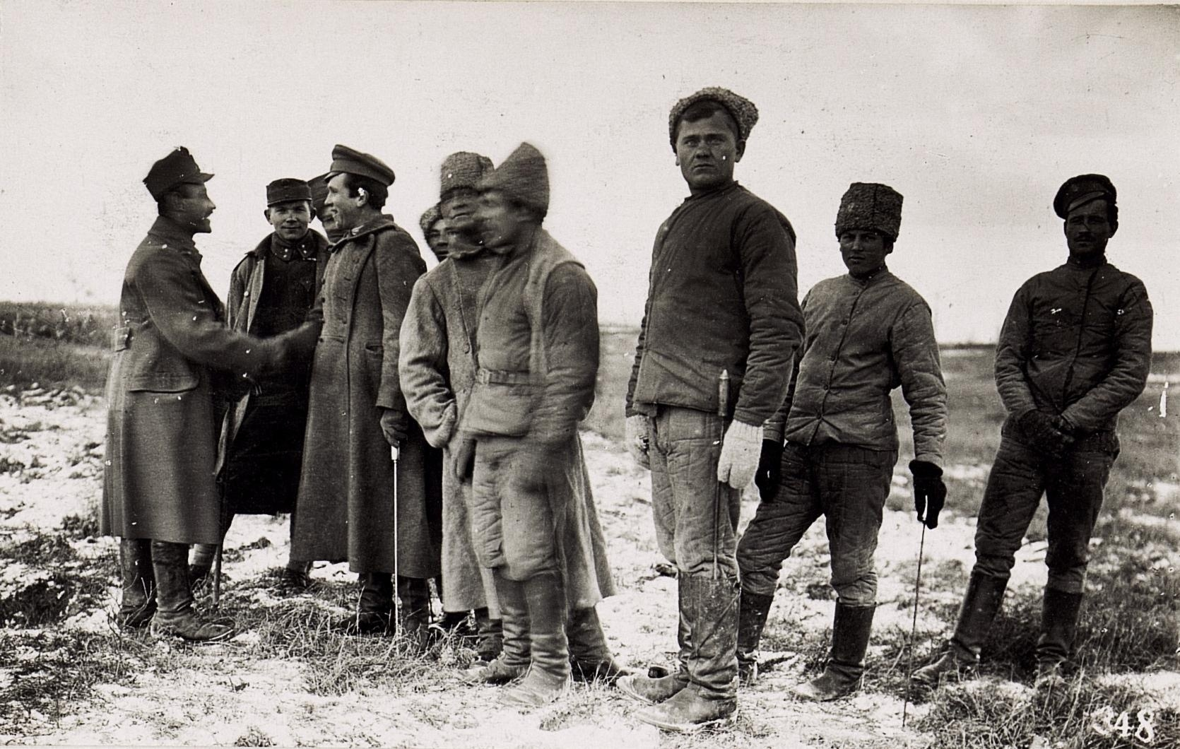 Vermutlich in der Umgebung von Wladimir Wolinsky, Russland, Wolhynien; Fotograf: Kriegsvermessung 4